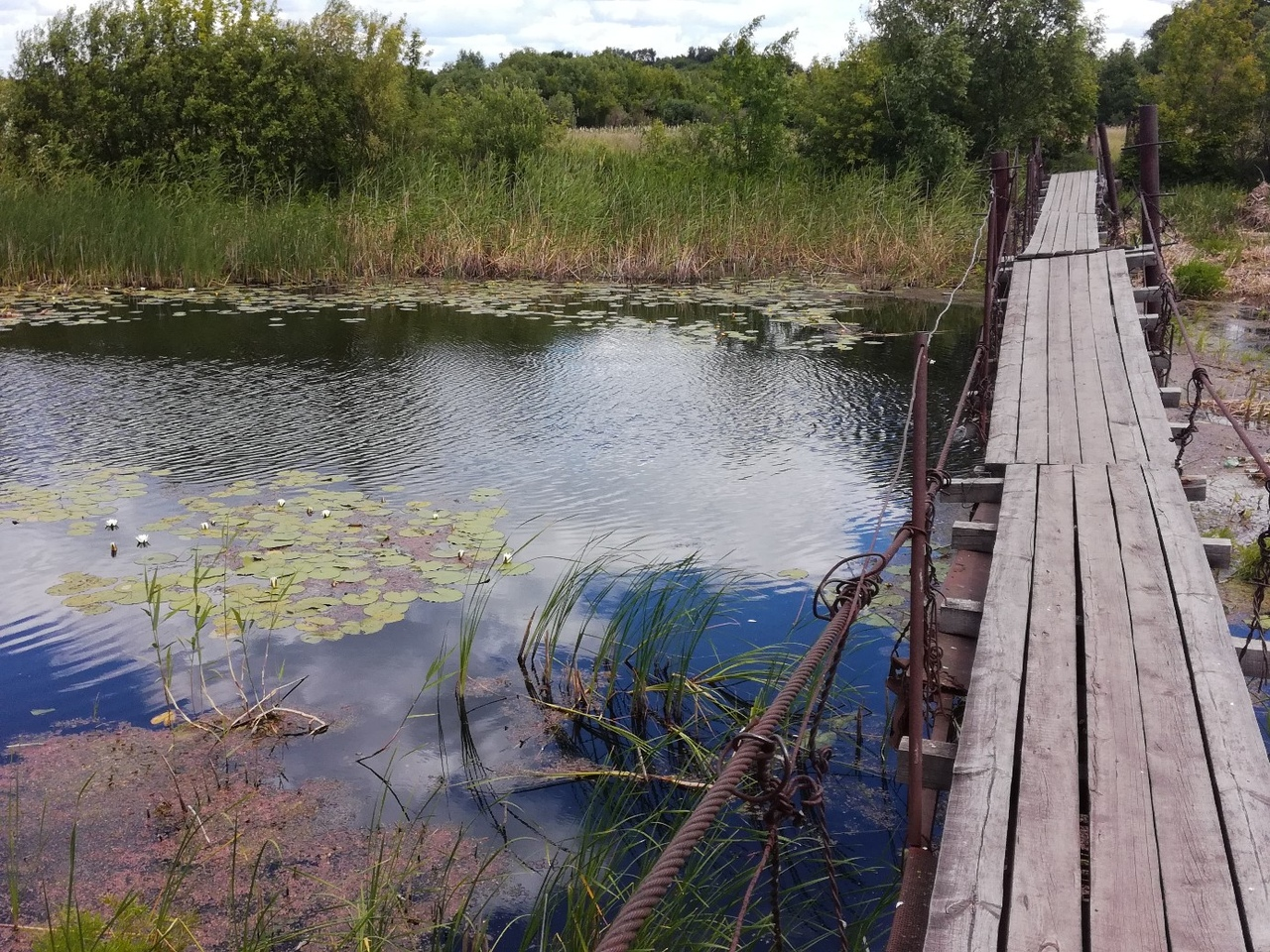 Подвесной мост в Новопокровке через реку Битюг